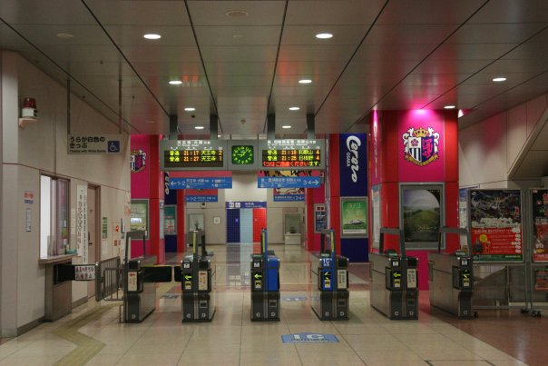 粵語: 阪和線嘅鶴丘站